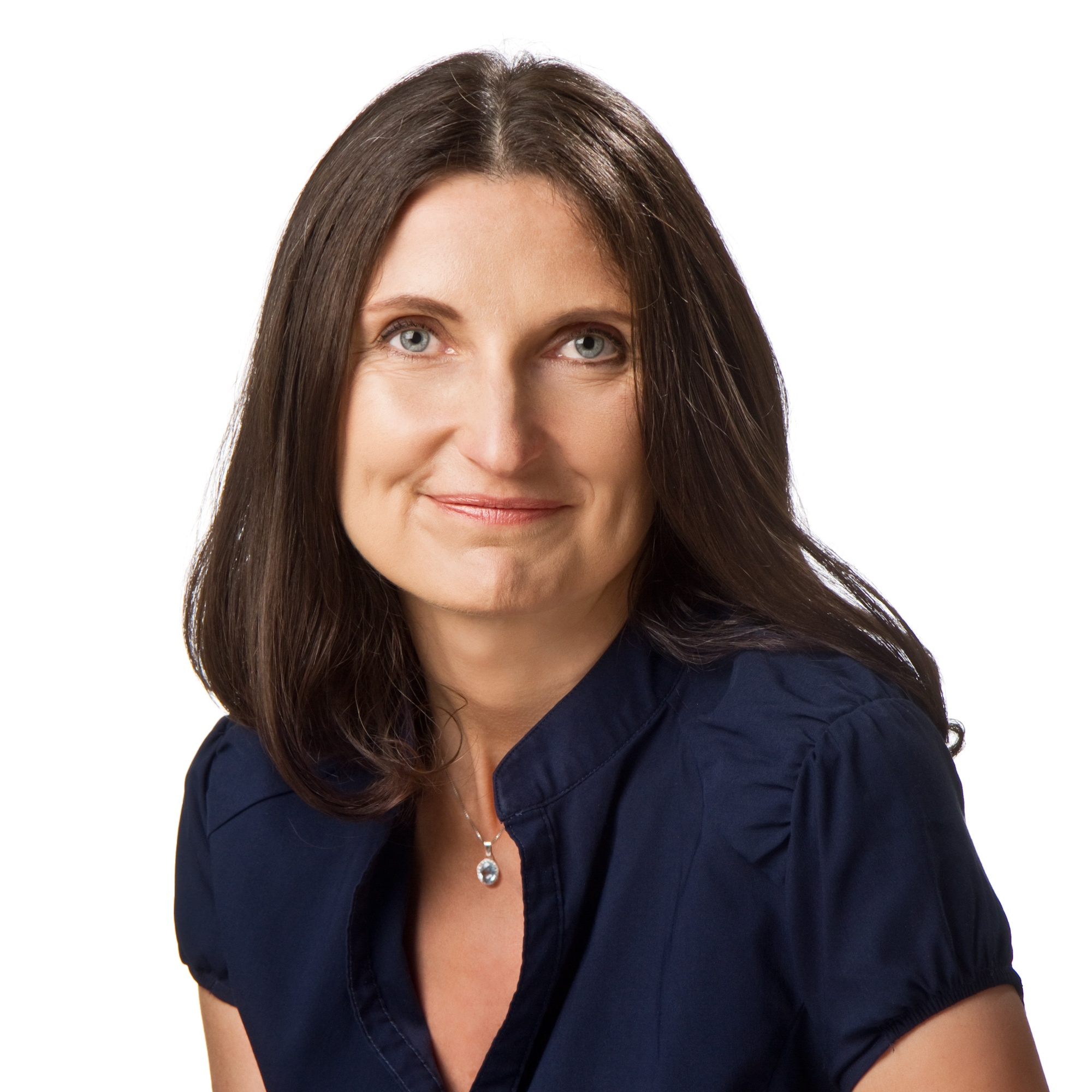 PharmDr. Margit Slimáková